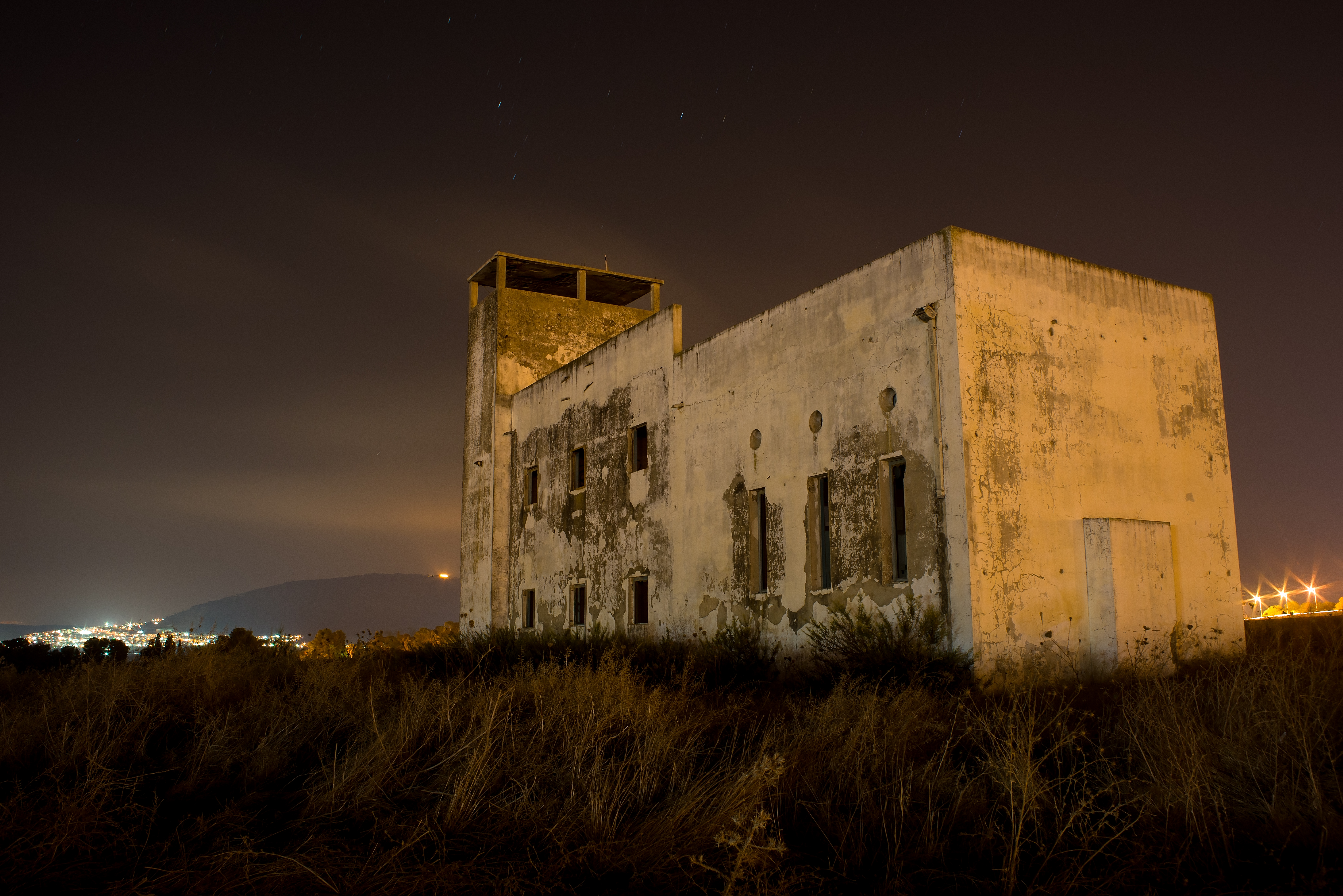 מחנה ישראל (דברת) היה קומונה של פועלי אגודת ישראל שהתארגנה לקראת חיי קיבוץ. אנשי הקבוצה התיישבו על אדמה שנרכשה בשנת 1925 בעמק יזרעאל, ליד קיבוץ דברת של היום.